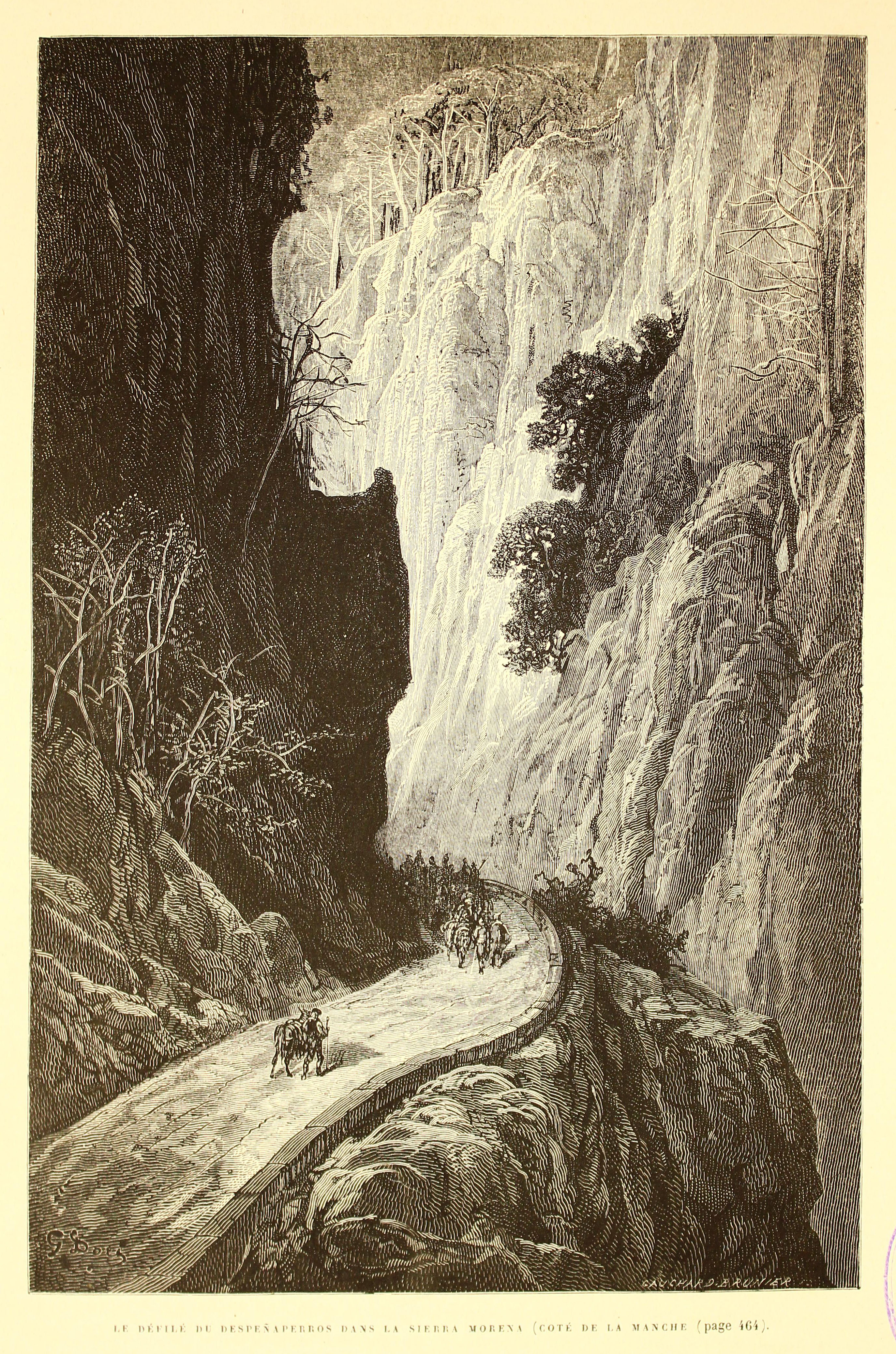 Autor: Davillier, Jean Charles, barón, 1823-1883 Descripción bibliográfica: L'Espagne / par Le Baron CH. Davillier ; ilustrée de 309 gravures dessinées su bois par Gustave Doré. - Paris : Librairie Hachette, 1874. - 799 p. : il. Materia: España- Geografía Materia: España- Usos y costumbres Ilustrador: Doré, Gustave, 1832-1883 Editor: Libreria Hachette Lugar de impresión: Francia, París Localización: Libro completo